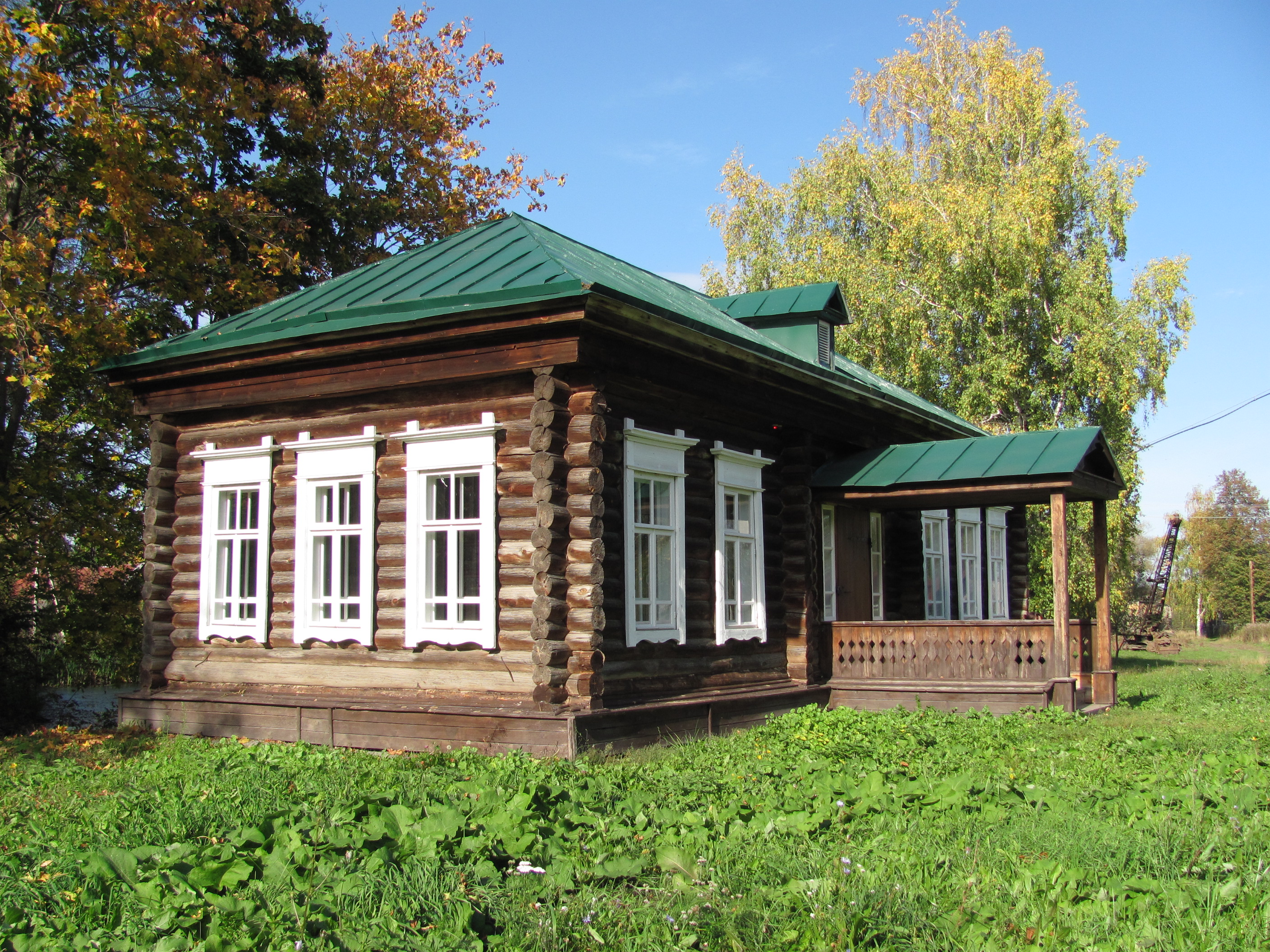 Здание церковно-приходской школы во Львовке (Большеболдинский район, Нижегородская область, Россия)